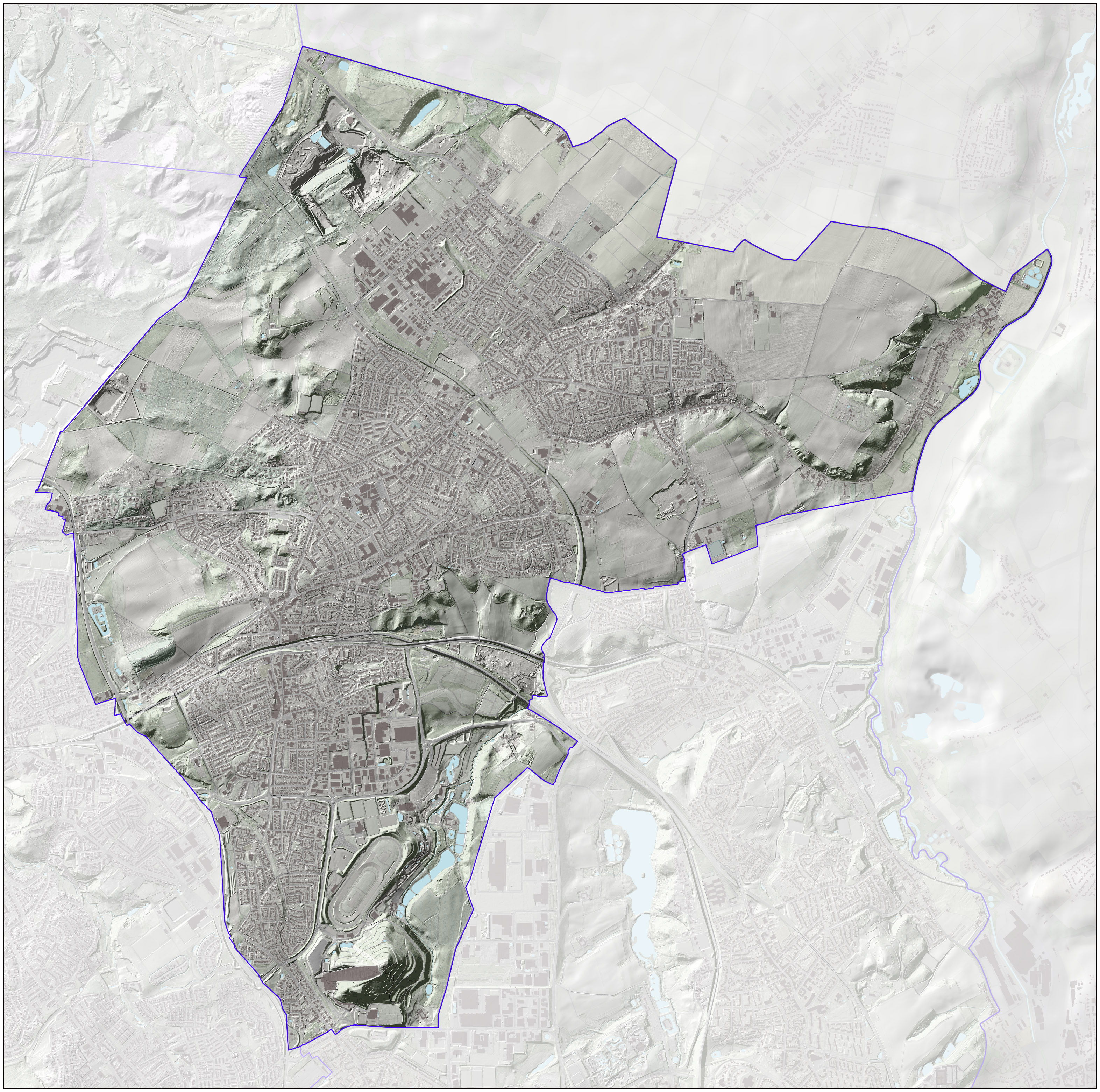 Reliëfbeeld van de gemeente, o.b.v. het Actuele Hoogtebestand Nederland (AHN2, open data) met subtiele elementen uit de Basisregistratie Topografie (BRT/Top10NL, open data). Kaartbeeld samengesteld door Jan-Willem van Aalst.